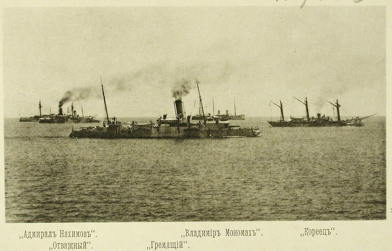 Слева направо - Адмирал Нахимов, Отважный, Гремящий, Владимир Мономах, Кореец во время учений